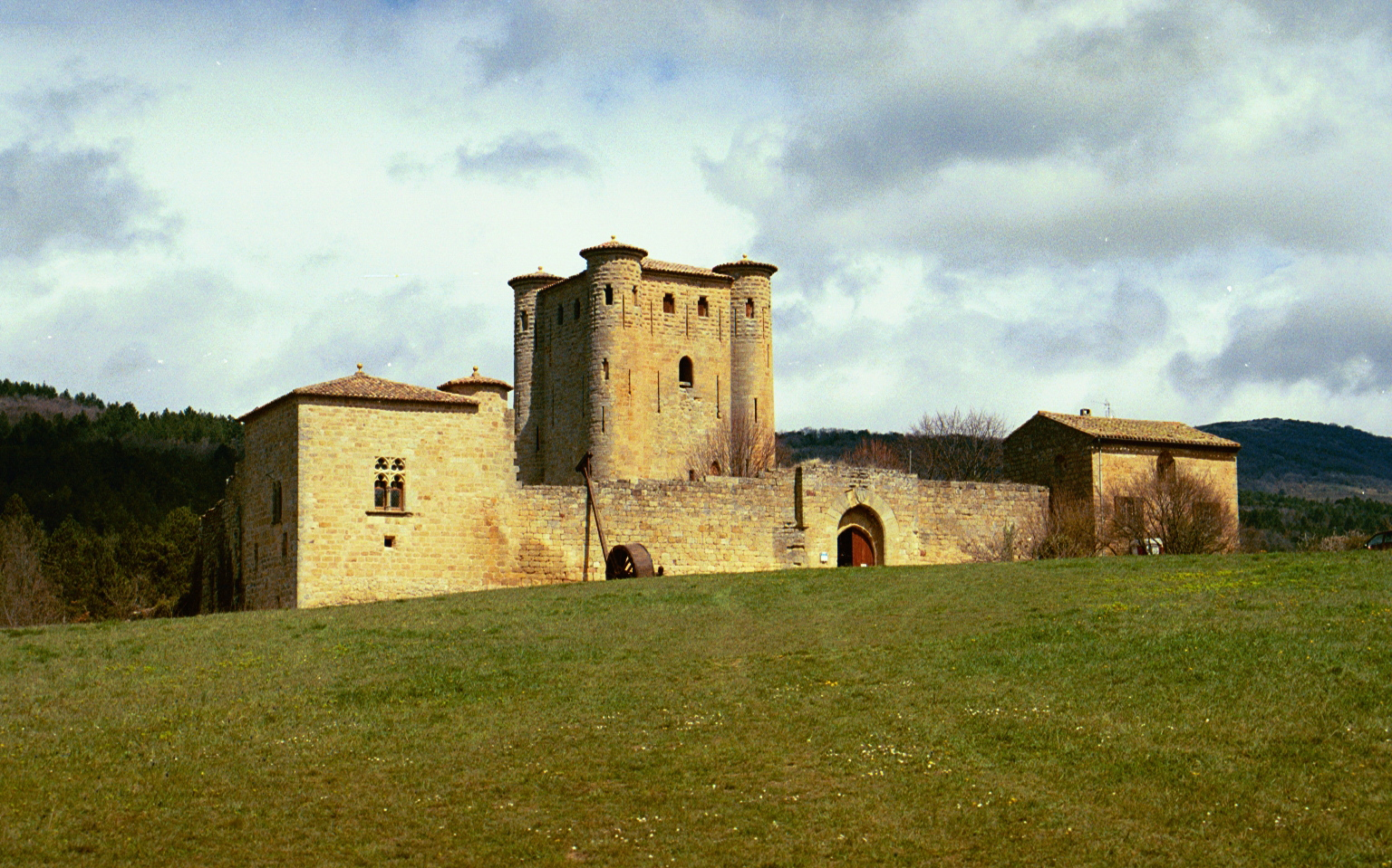 Castel of Arques, châteeau d'Arques en pays Cathare (Aude 11). Photo personnelle